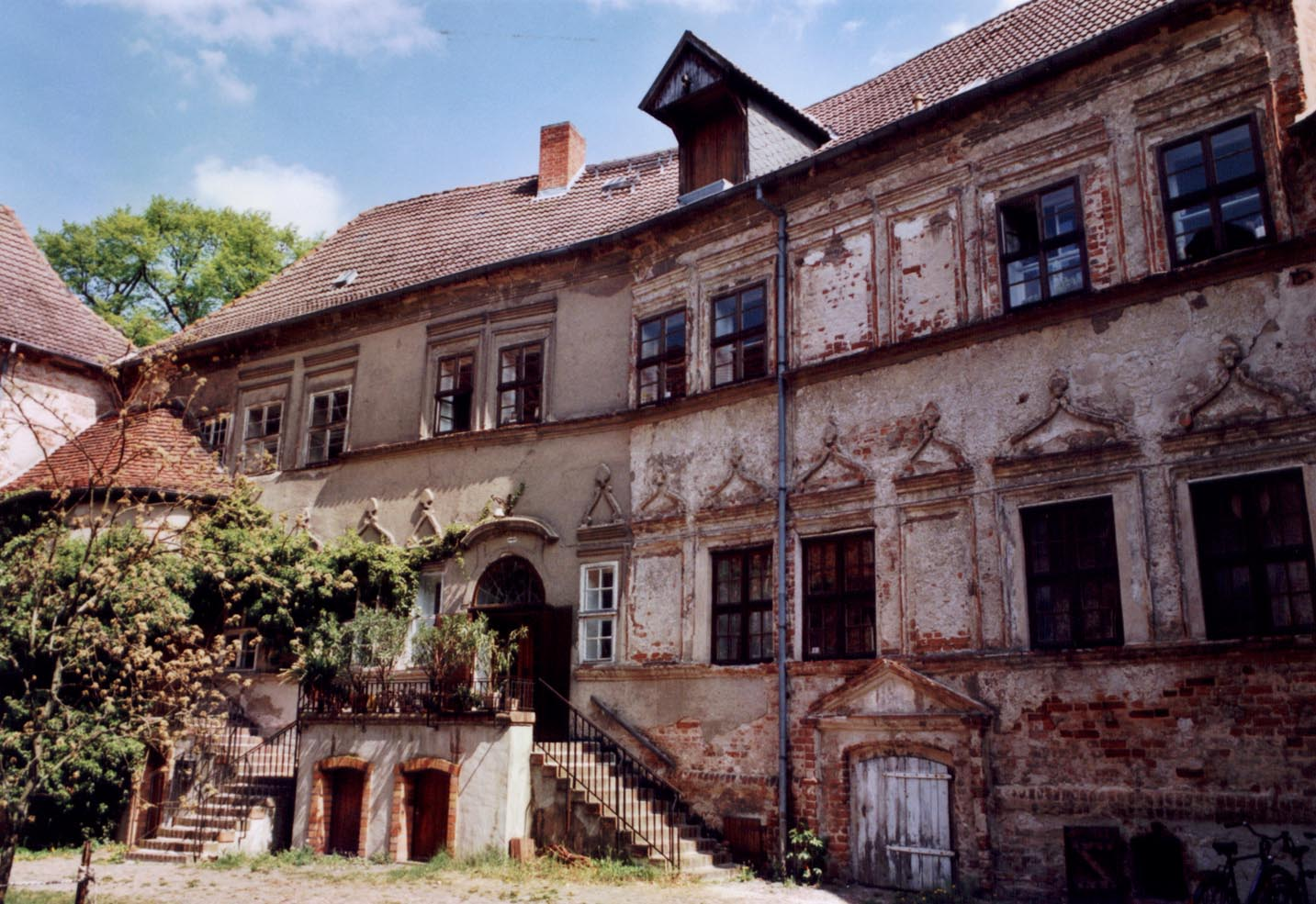 Burg Goldbeck, Südseite vom Burghof aus